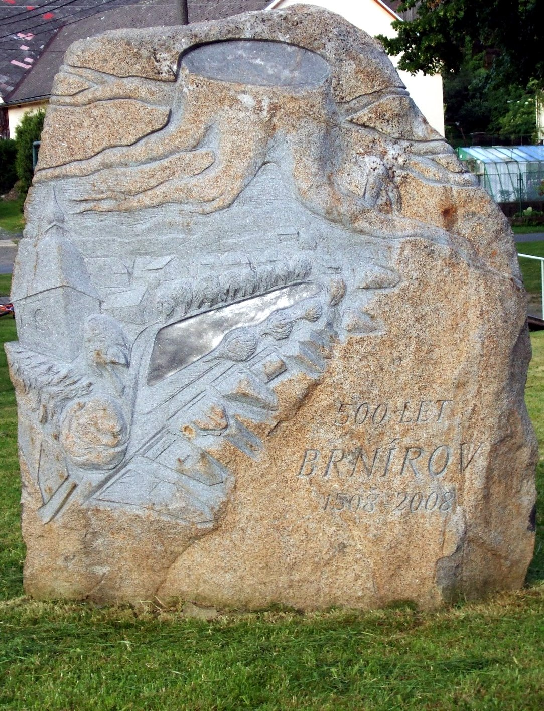 Brnířovský pařez-pomník k 500. výročí založení obce (2008)